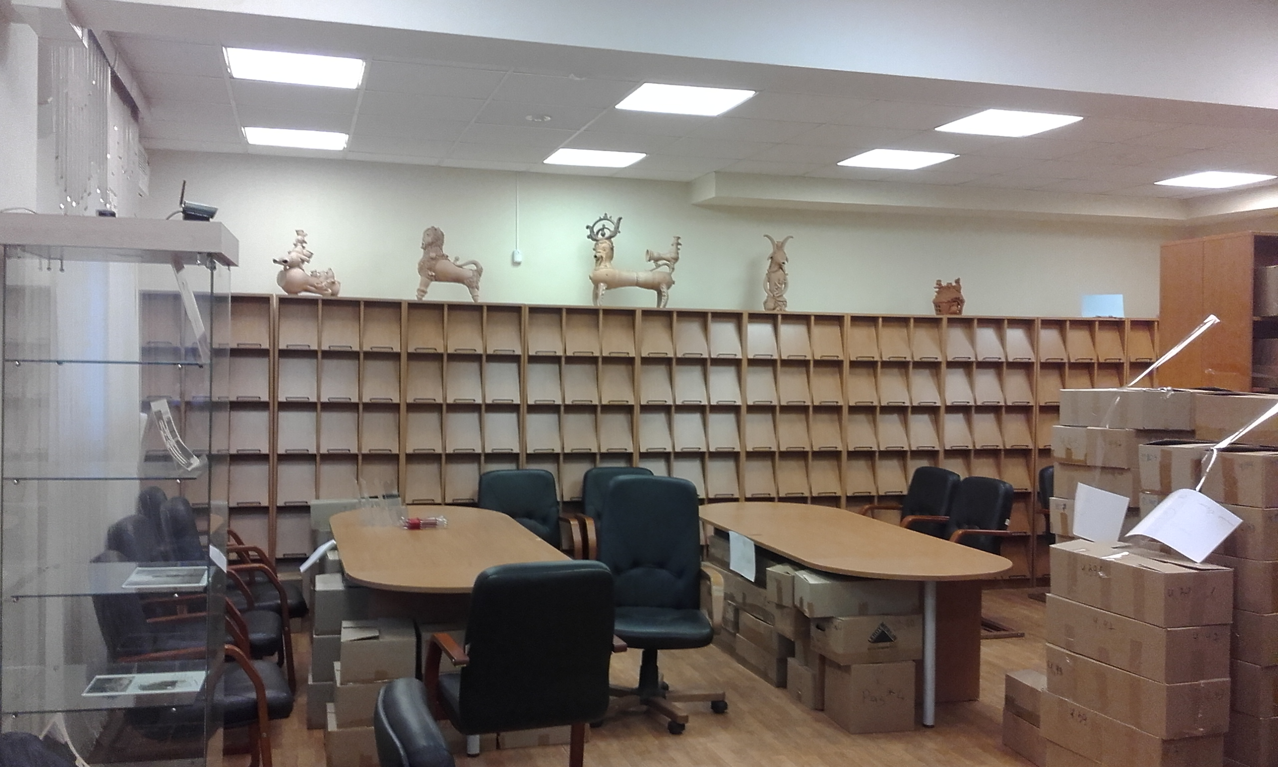 Порожні полиці у Бібліотеці Української літератури. Березень 2017